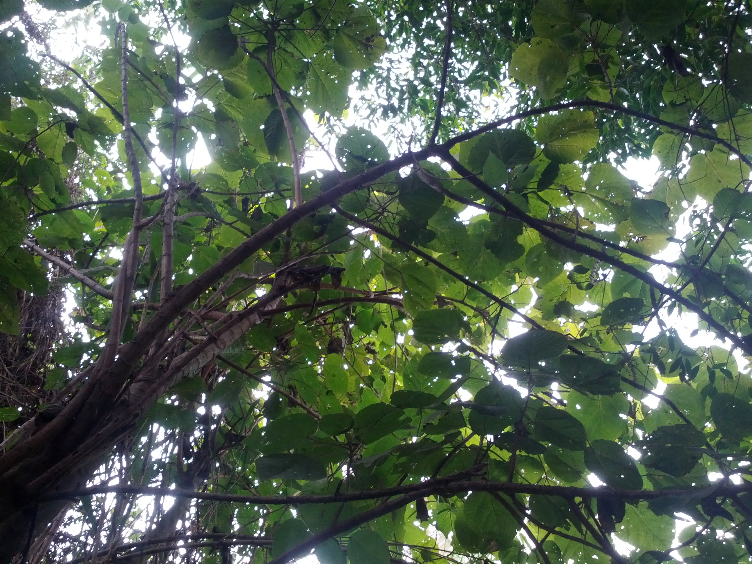 Arbol de Chichicaste, 5 metros Aprox.